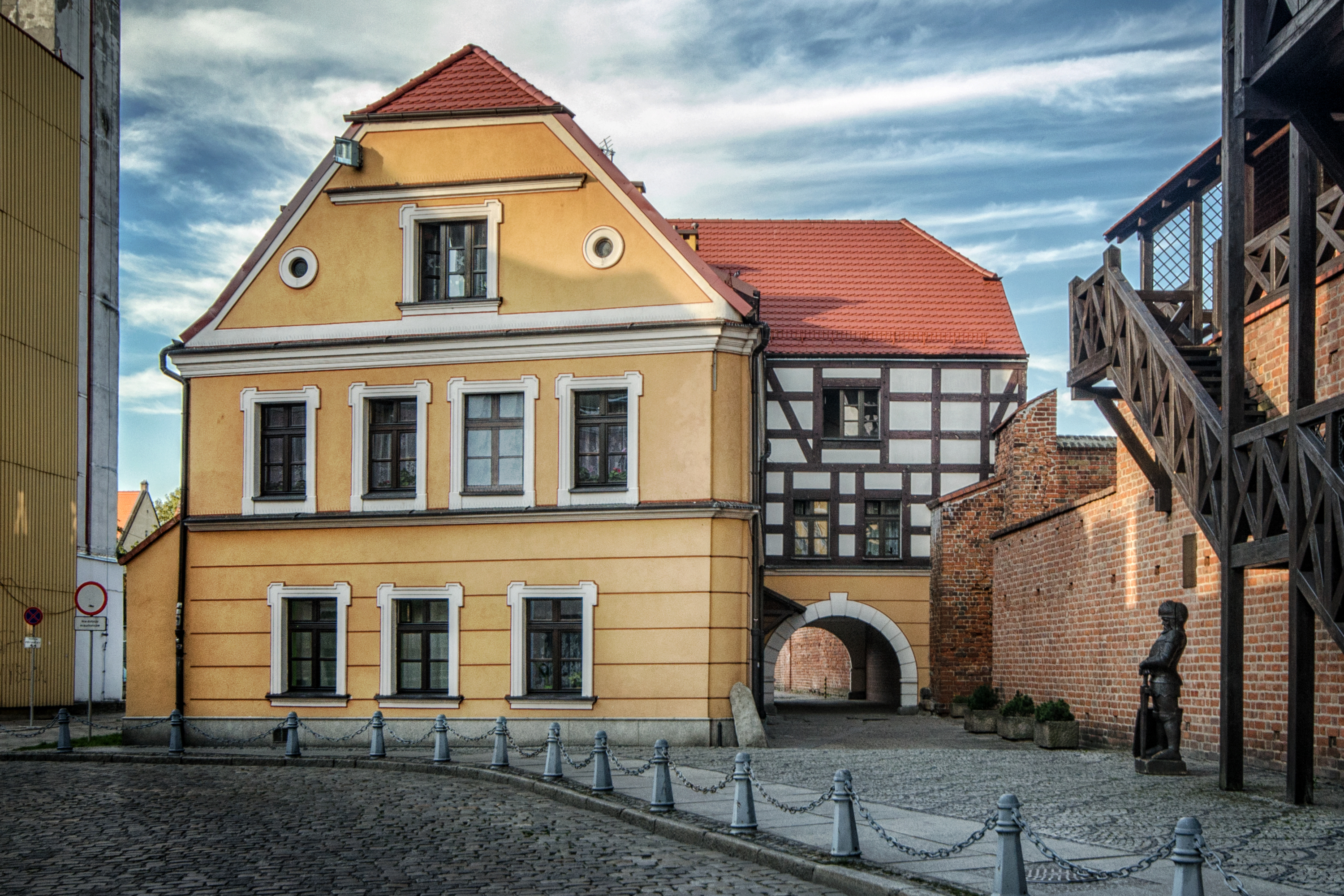 Namysłów, dom "Burmistrzówka", XVIII, 1 poł. XIX